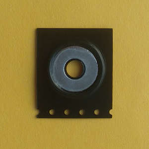 Foldscope Magnetkoppler